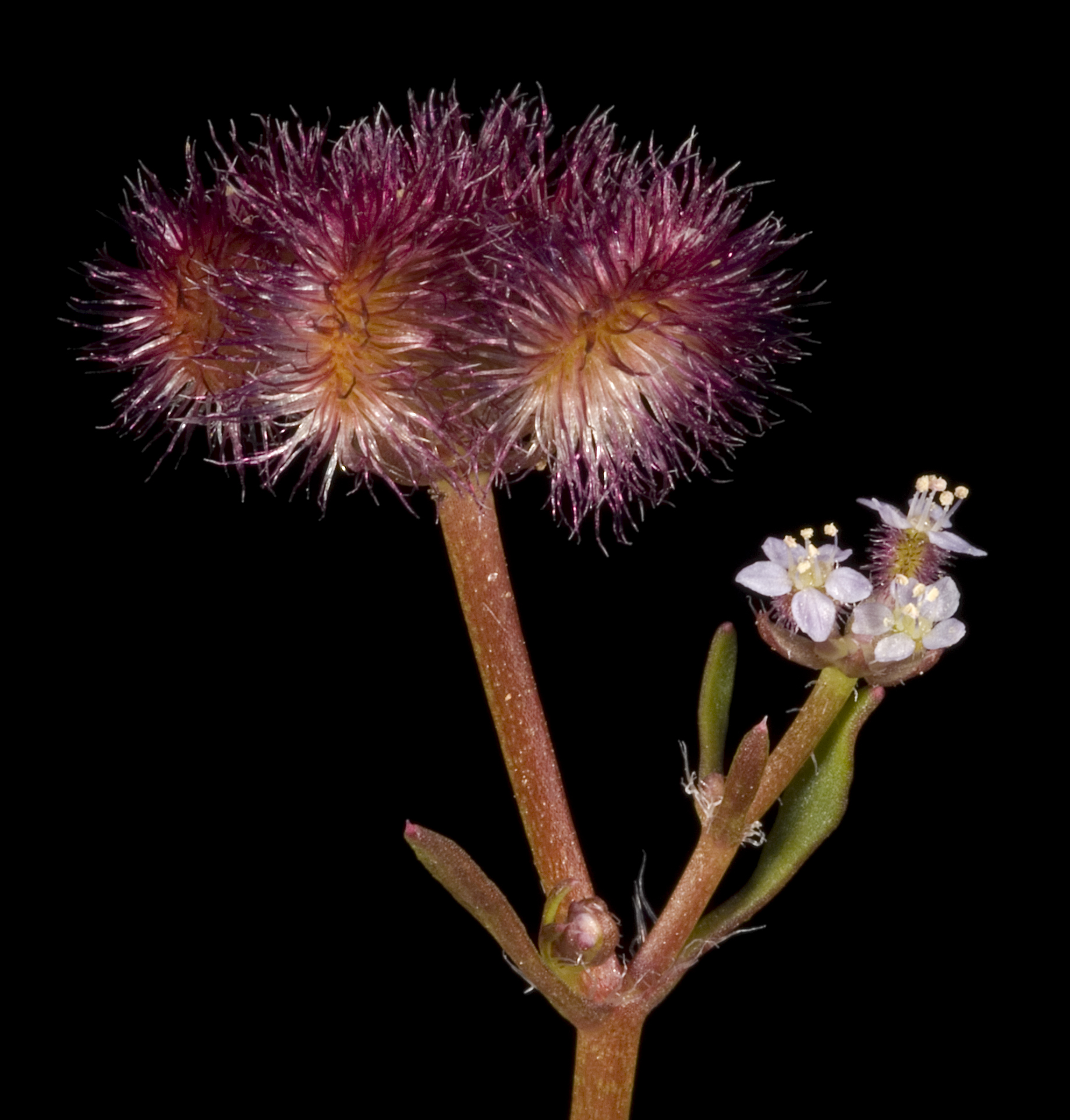 KRT3355